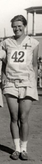 Women’s World Games 1926 / Andra Internationella Kvinnliga Idrottsspelen, Göteborg 1926. Swedish athletes/svenska laget: standing from left to right/stående från vä: Inga Gentzel (35), Elsa Svensson (29), Inga-Greta Broman (98), Emy Pettersson (50), Ruth Svedberg (97), Elsa Haglund (37), Anna-Lisa Adelsköld (24), Sylvia Stave (78), Ann-Margret Ahlstrand (42) kneeling from left to right/knästående fr vä: Asta Plathino (36), Märta Johansson (80), Vera Jacobsson (68), Maud Sundberg (57)